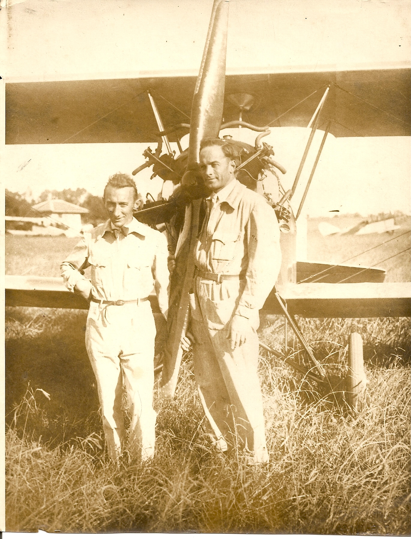 Sfreddo & Paolini con el avión S y P I